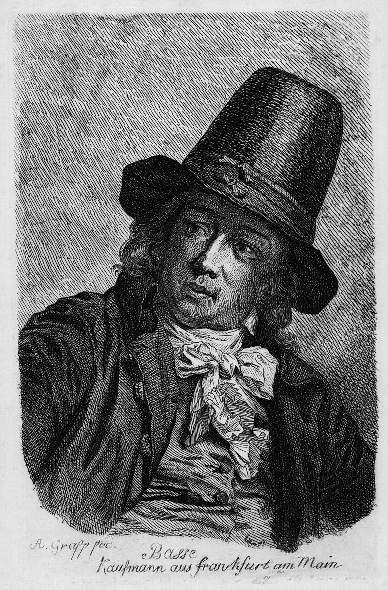 Basse, Kaufmann aus Frankfurt a. M., Radierung. 18,4 x 11,8 cm